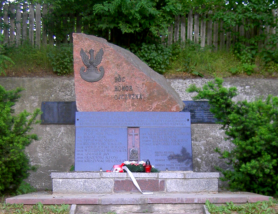 Tarnogród, Poland - Monument in Korchów Gate • Tarnogród, Polska - Pomnik w Bramie Korchowskiej